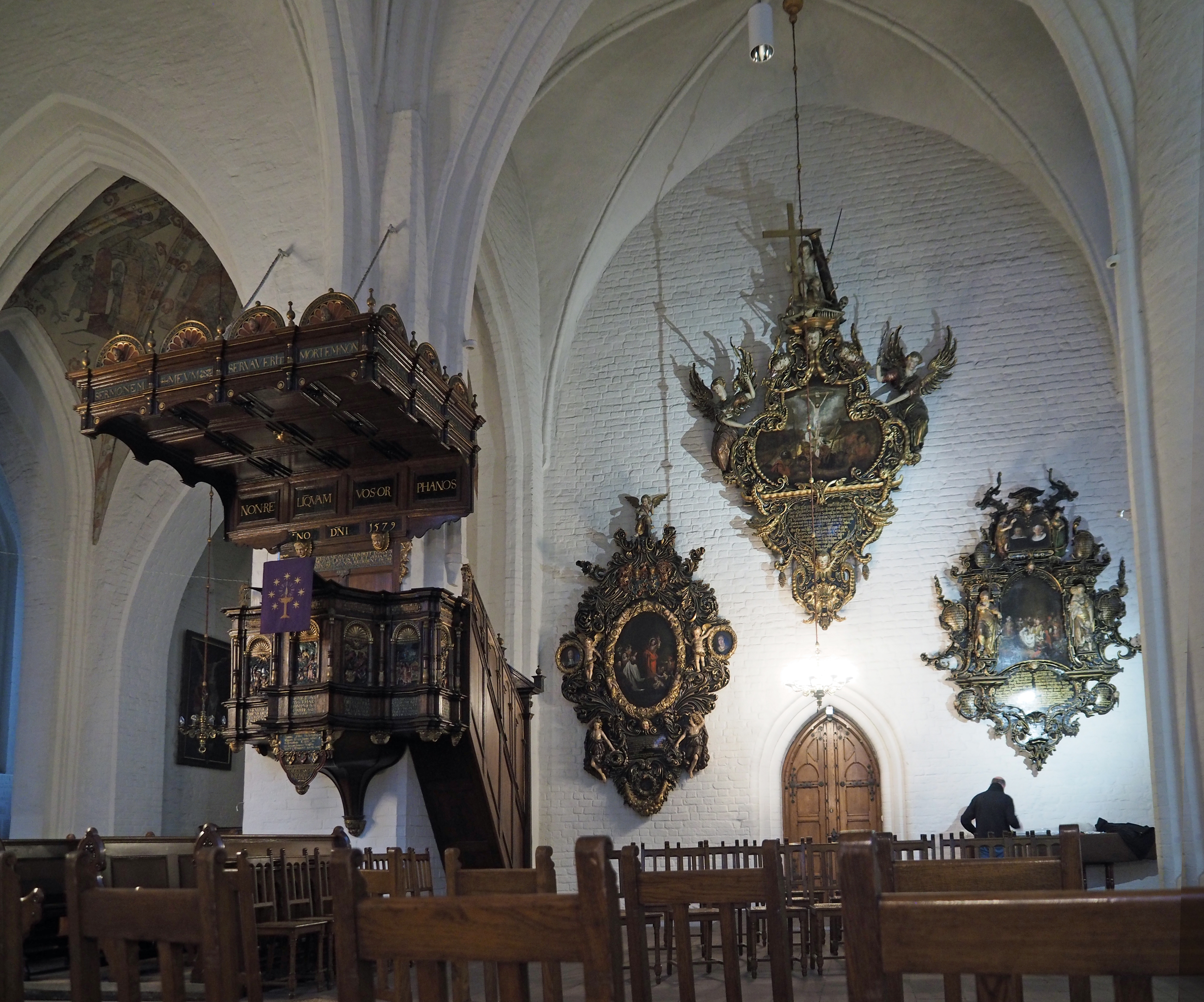 Kanzel in der Marienkirche (Flensburg)